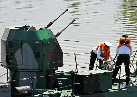 Проекта 1204 "Шмель" - Дивизионом артиллерийских катеров охраны водного района Каспийской флотилии